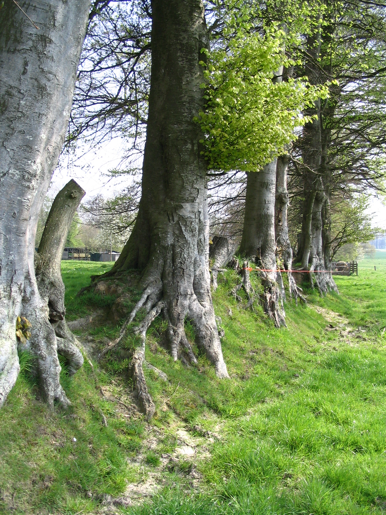 Haie du bocage normand, région de Fécamp, France.